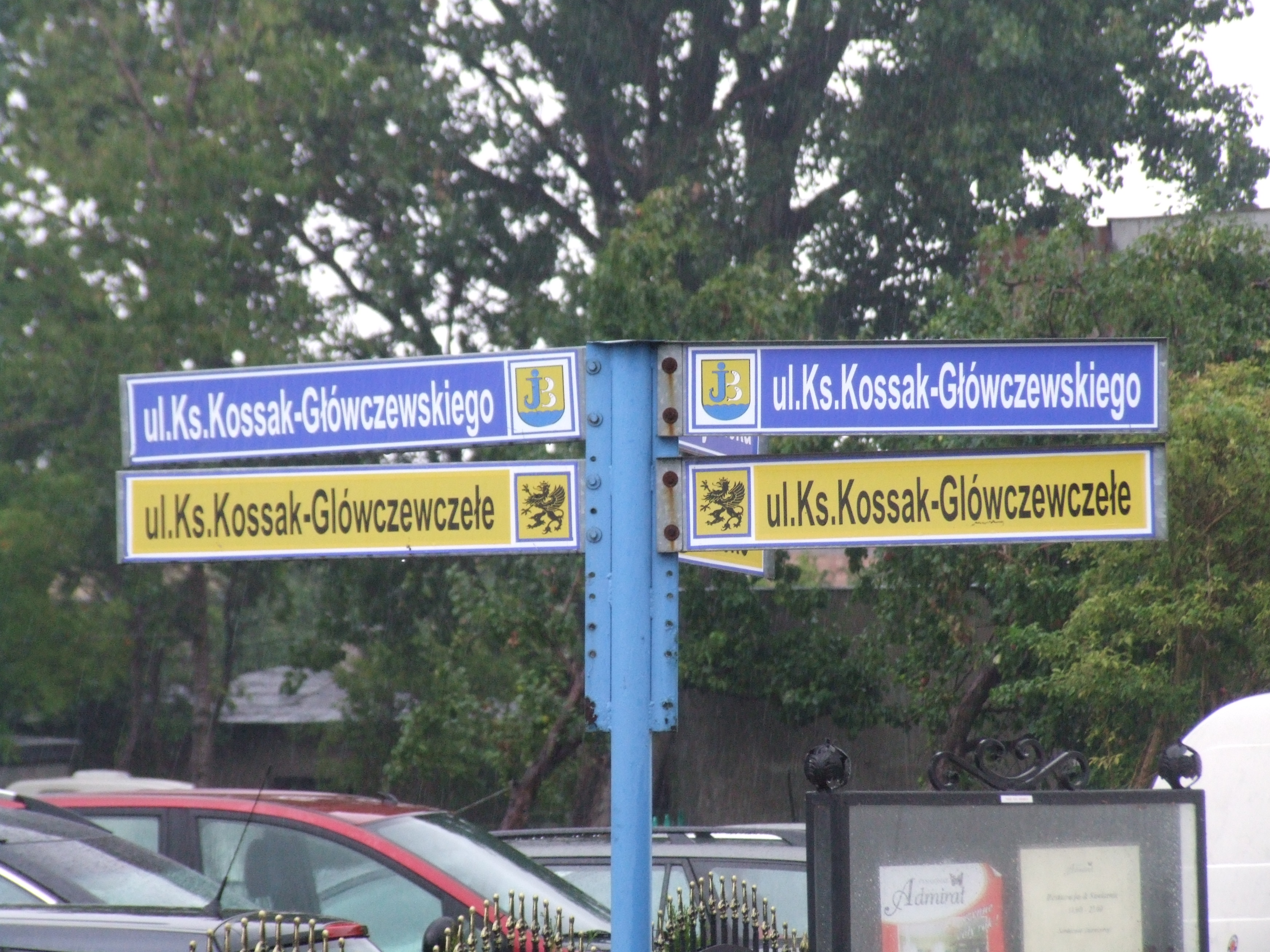 ulica Księdza Kossak-Główczewskiego, Jastarnia